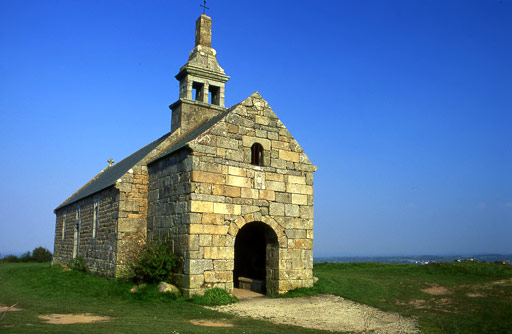 Description : Pédernec (22) - Le Menez Bré - Chapelle Saint Hervé Date : non déterminée Auteur : Ifernyen Source : Archives personnelles, scan d'après diapositive Statut : GFDL Ifernyen